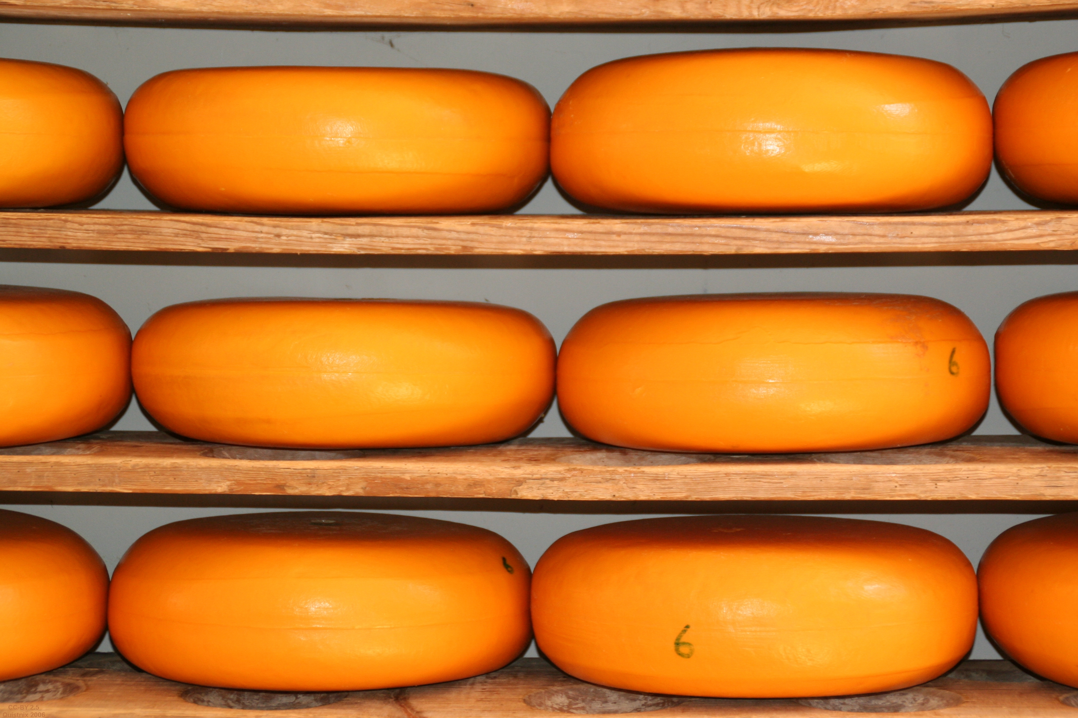 Kaas ligt op planken om te rijpen. Foto gemaakt in het Nederlands Openluchtmuseum. Eigen werk. Cheese ripening